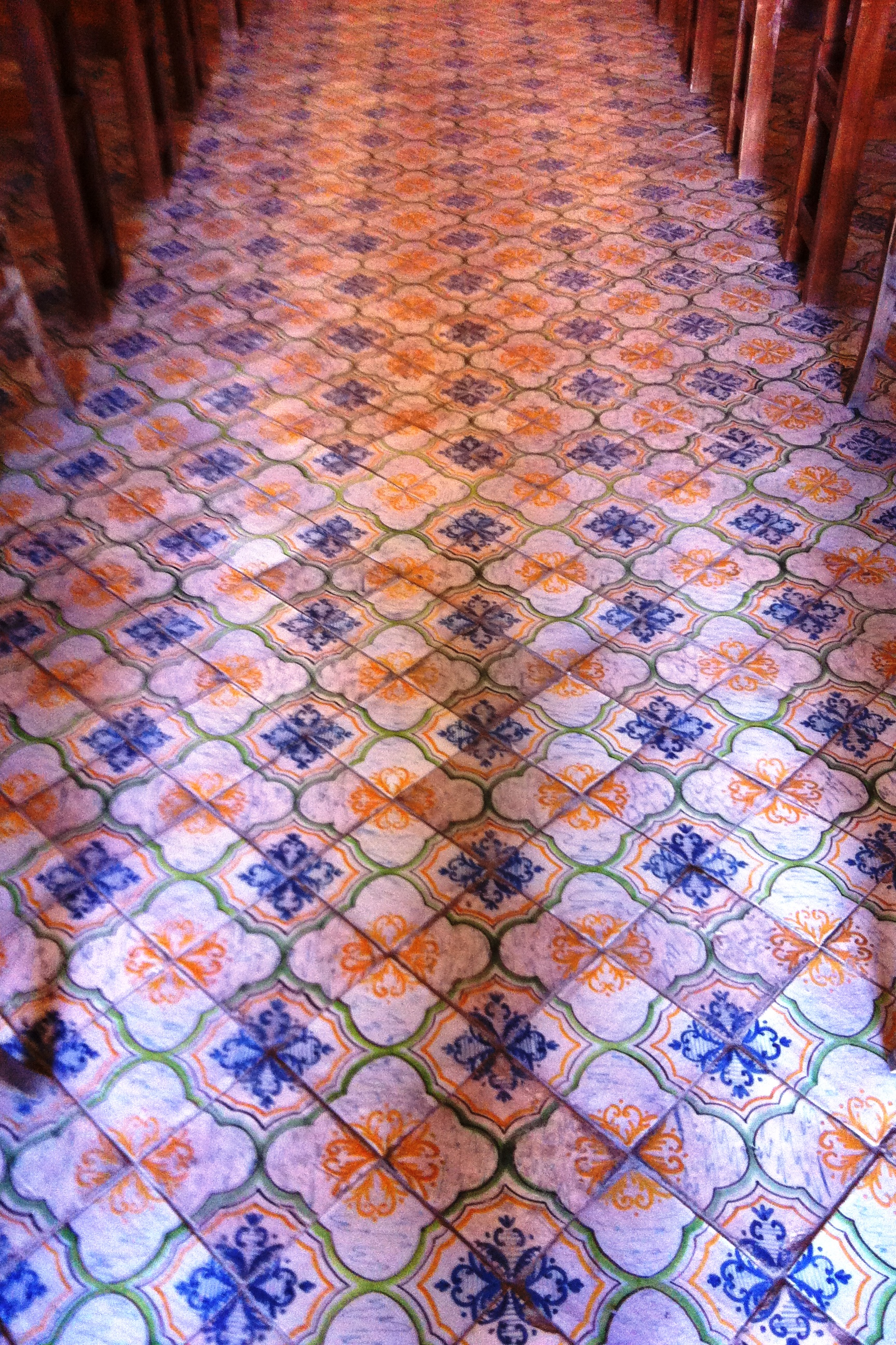 Pavimento maiolicato di produzione caltagironese del sec. XVIII. Militello, chiesa di S. Giovanni Battista.